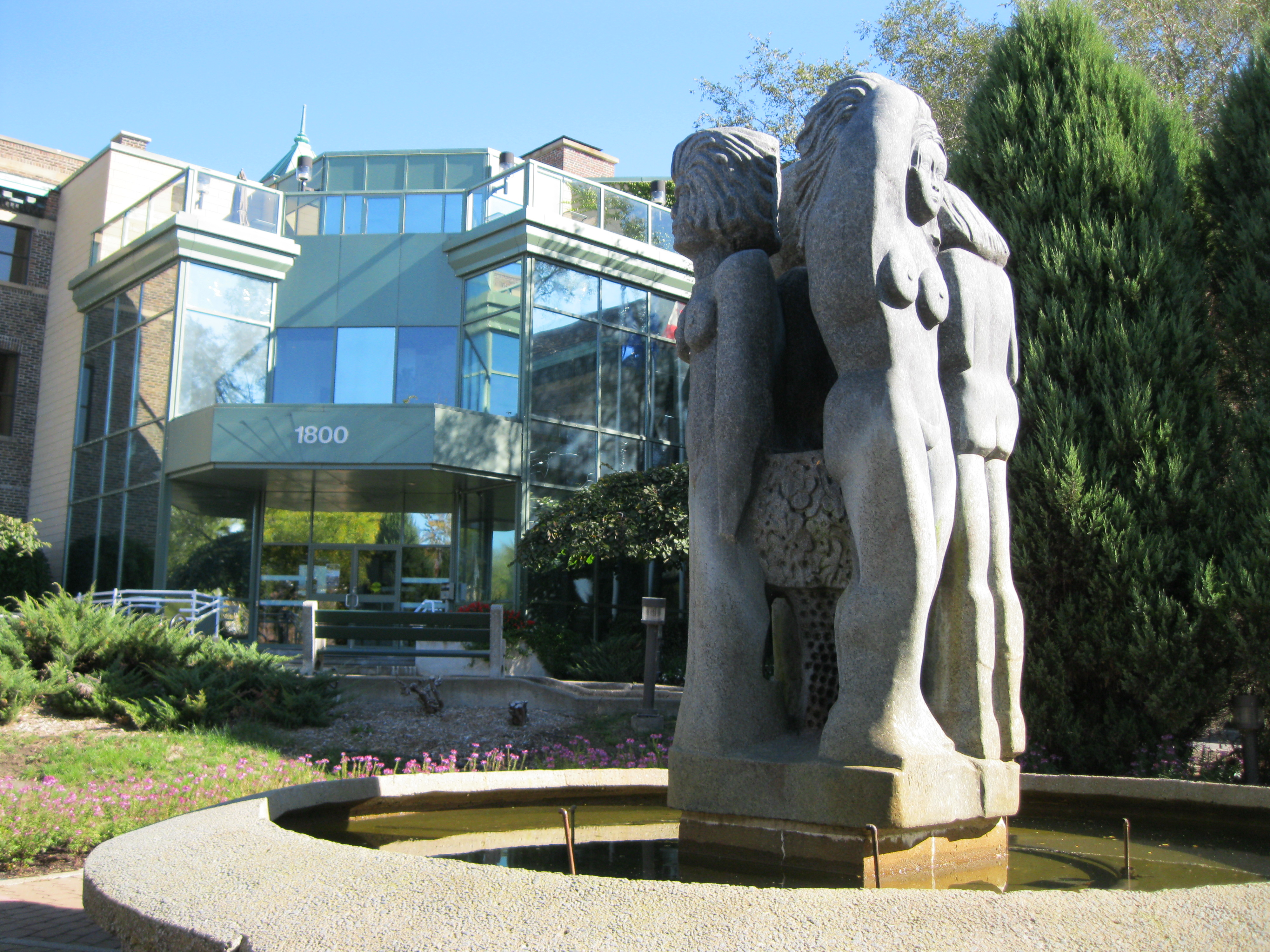 Fontaine de vie (Les Baigneuses), de 1977, est une sculpture-fontaine de Pierre-Gilles Dubois (1938-1995) installée devant l'hôtel de ville de Lachine, à Montréal.